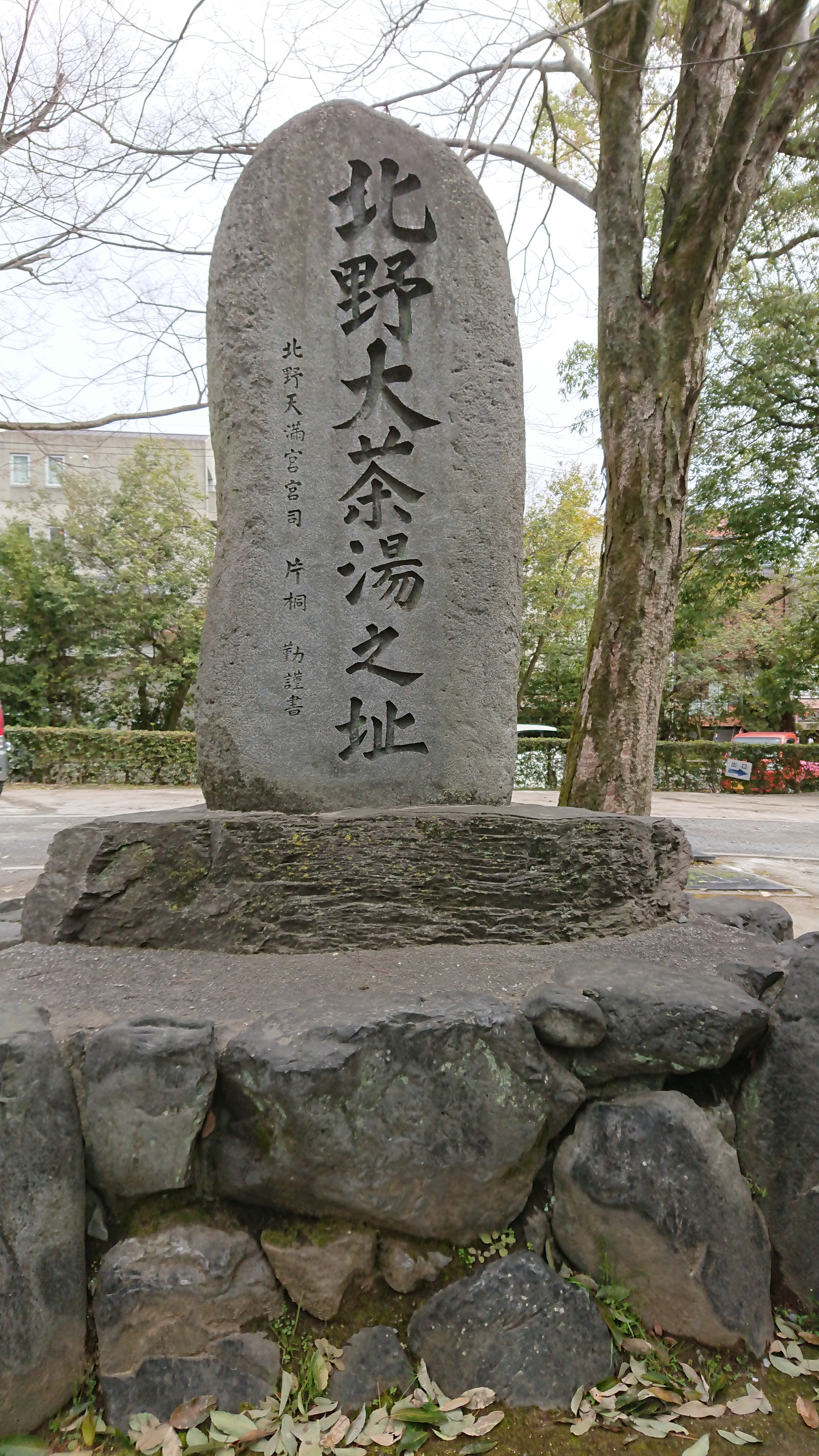 北野大茶の湯碑